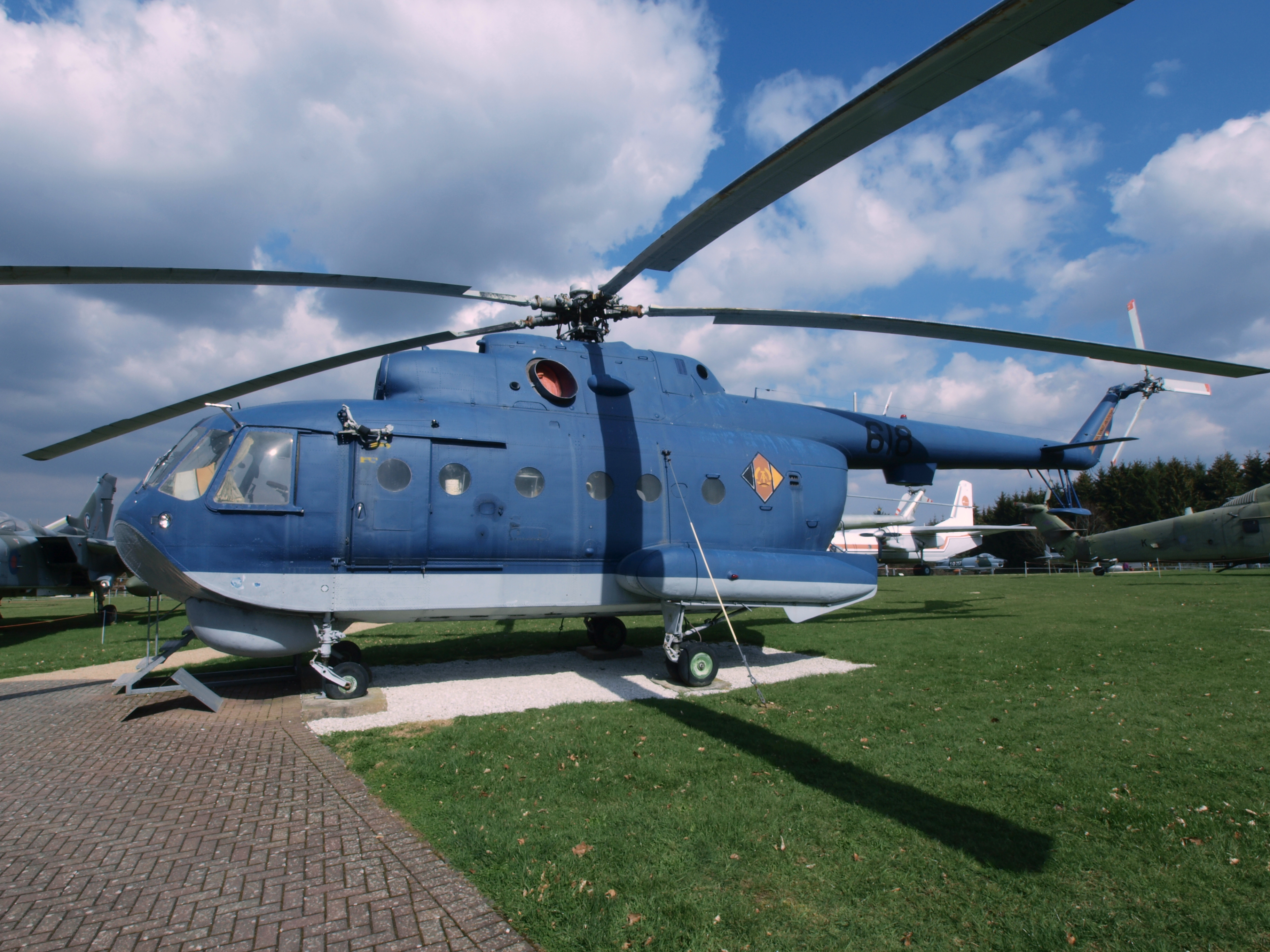 Photographed at Hermeskeil.